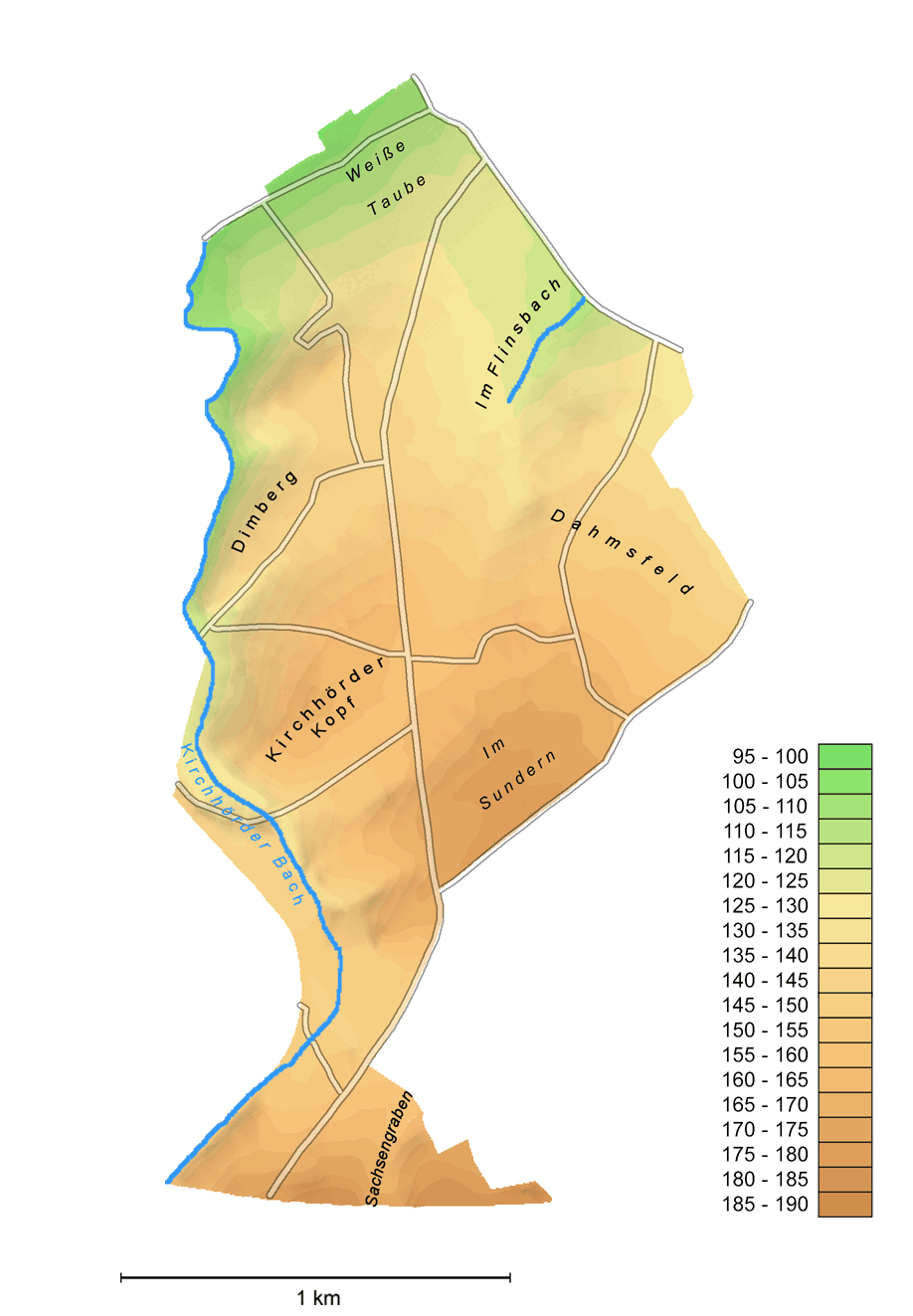 Hoehenkarte des Ortes Kirchhoerde